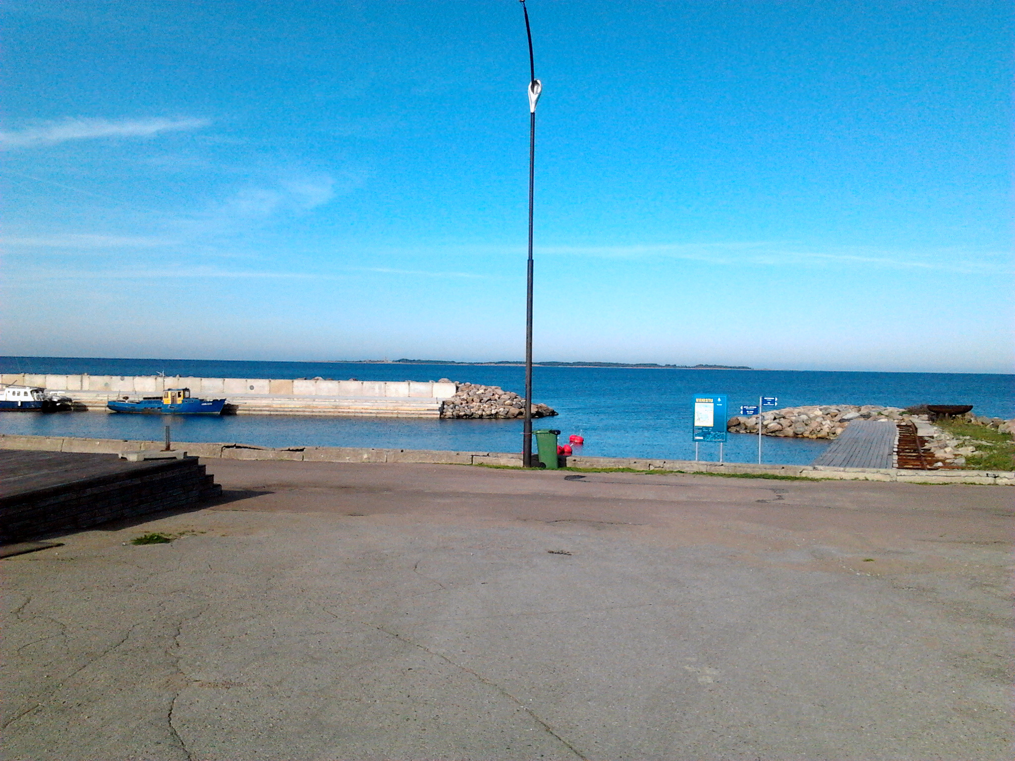 Причал